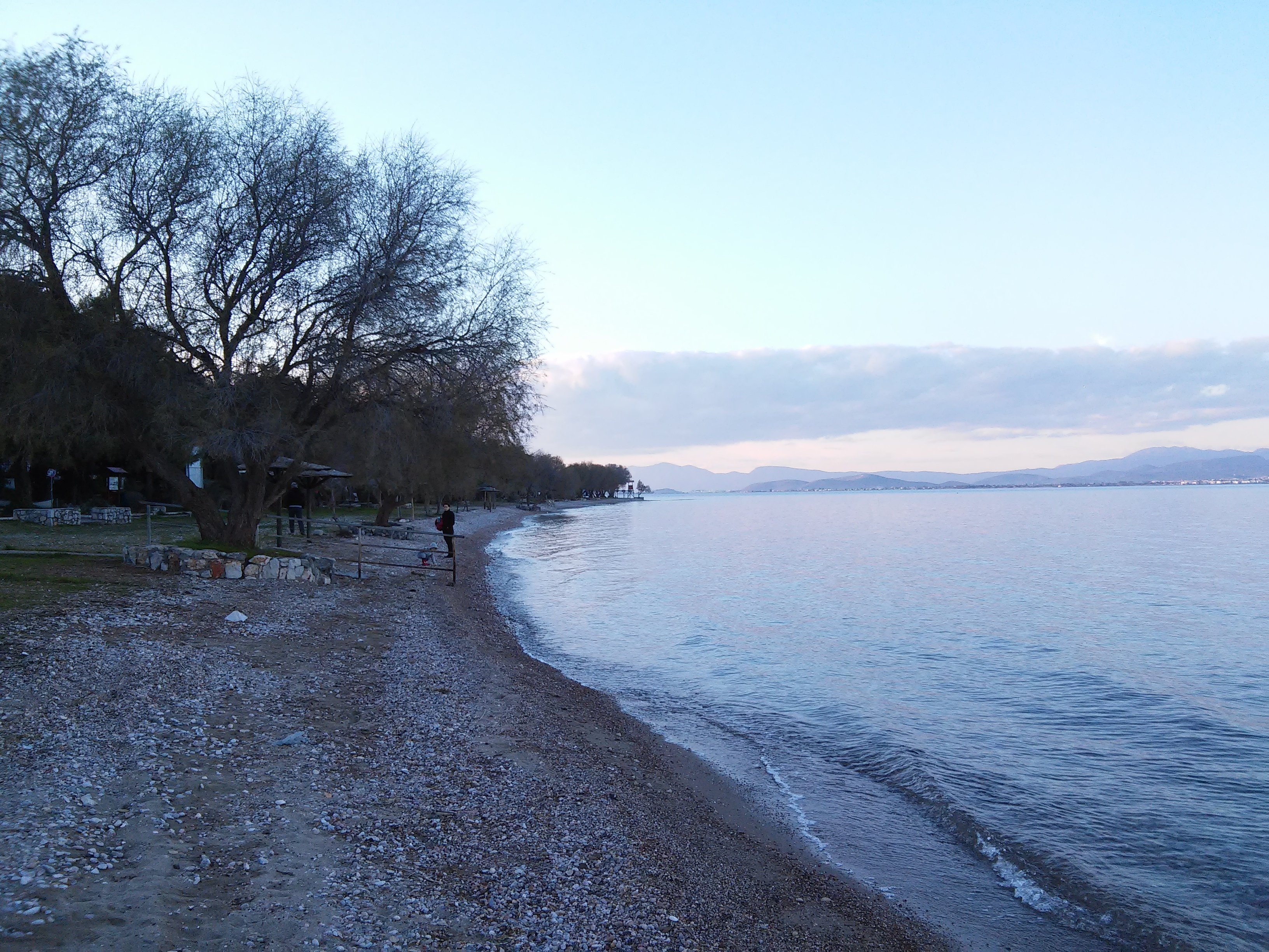 Παραλία Πλάκα Δηλεσίου